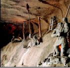 Фото. Велічка, Польща